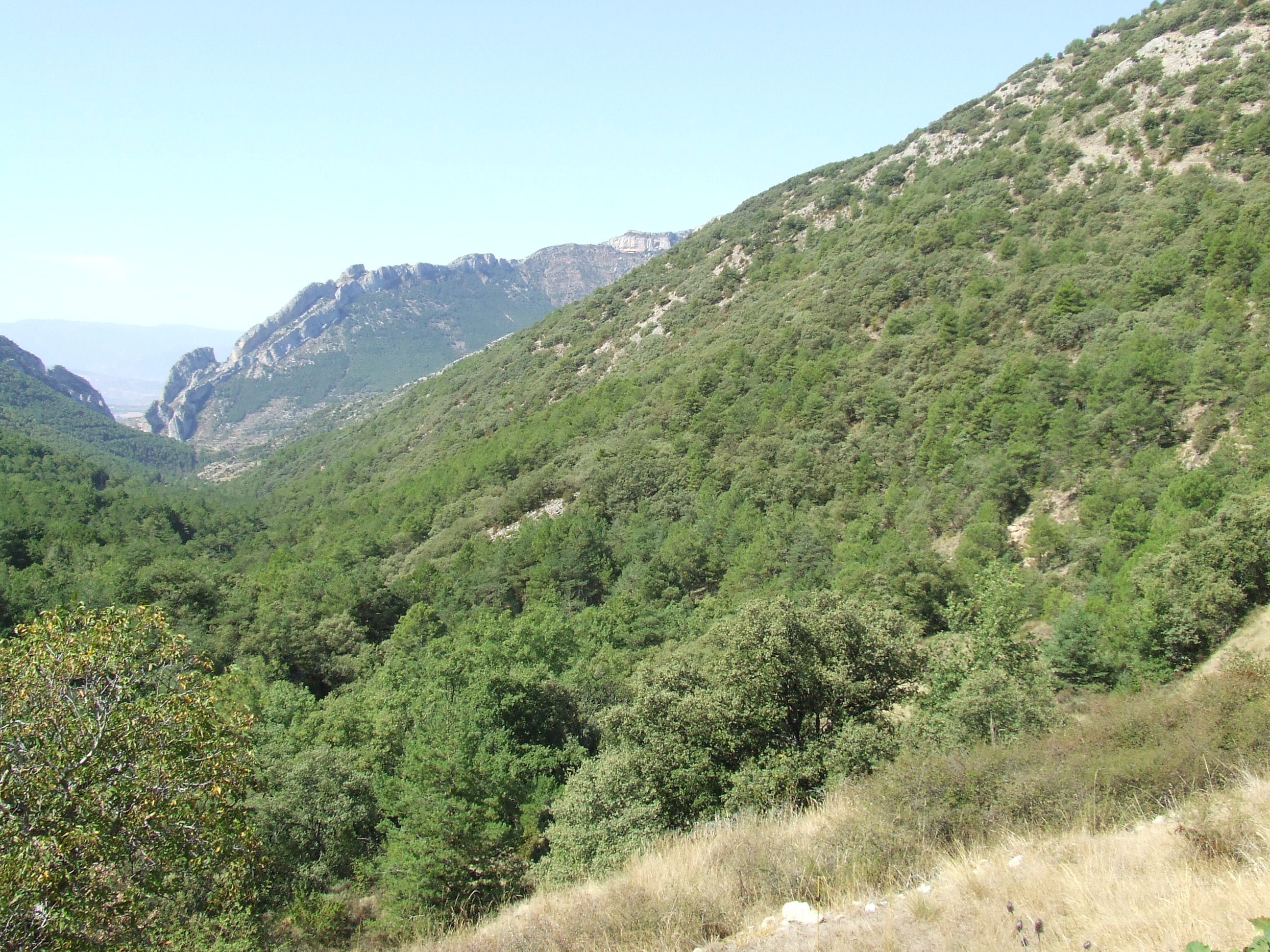 El Solà de la Torre i la Vinyassa (la Torre d'Eroles, Abella de la Conca, Pallars Jussà)